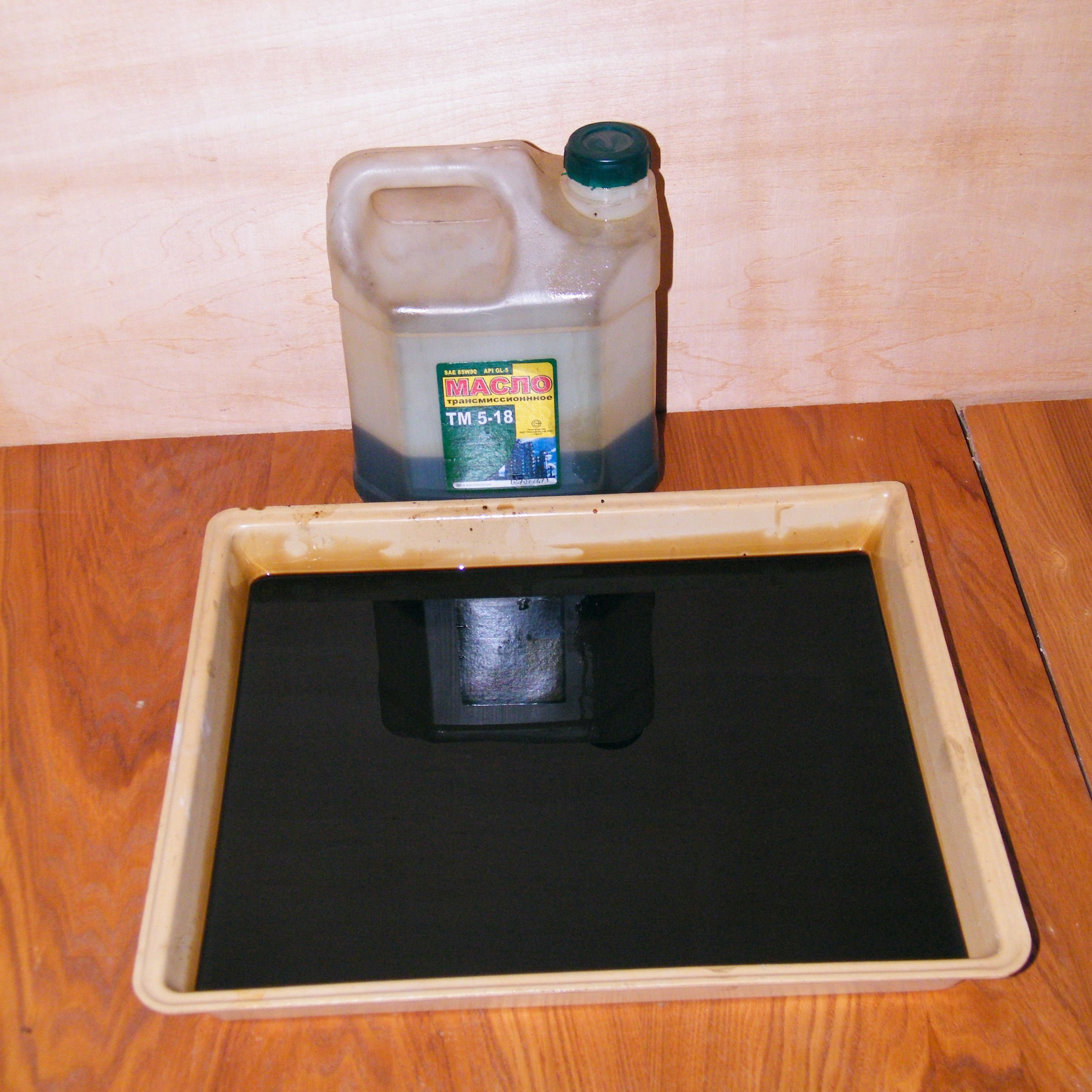 Трансмиссионное масло ТМ 5-18